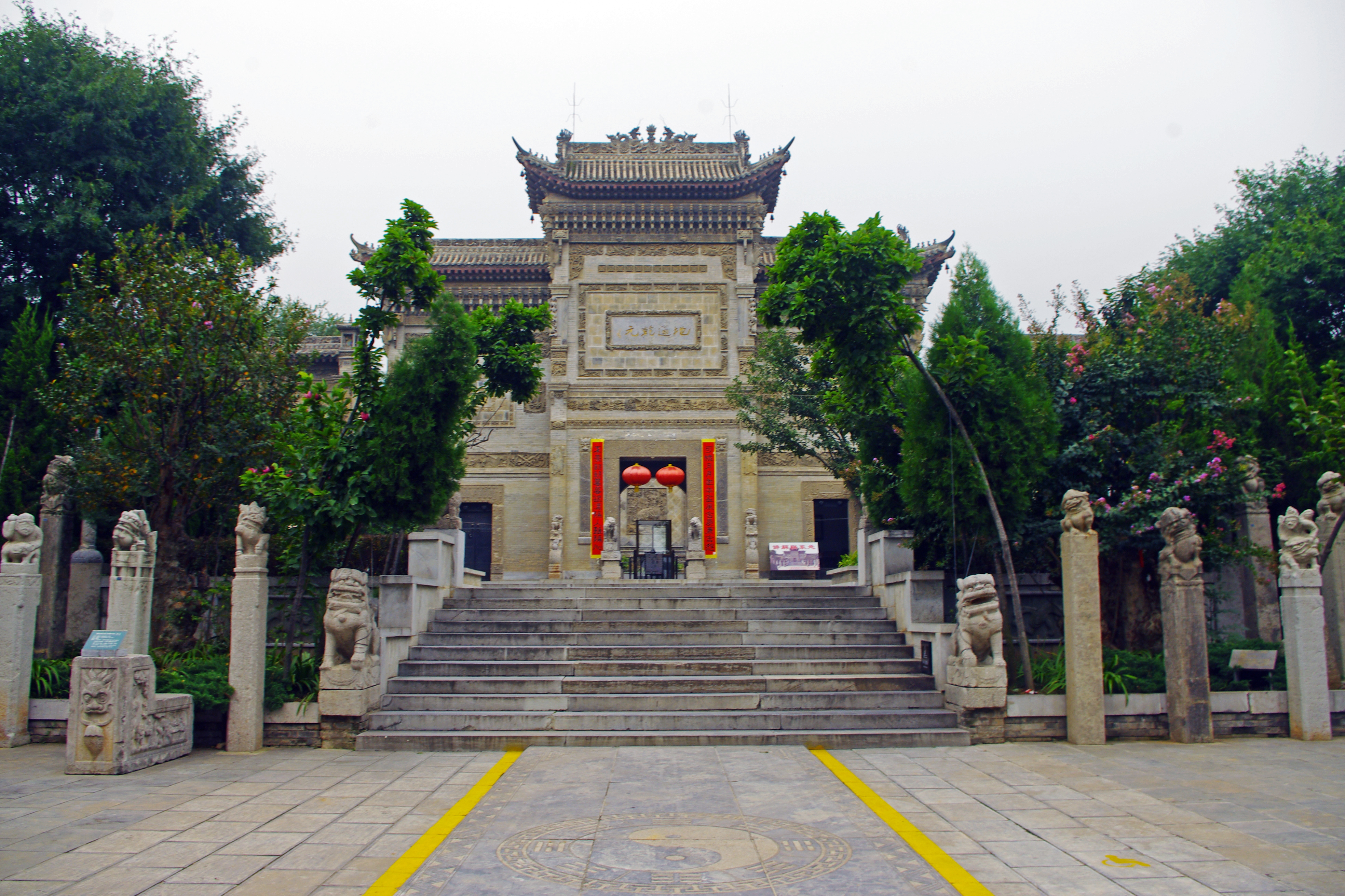 关中民俗博物院